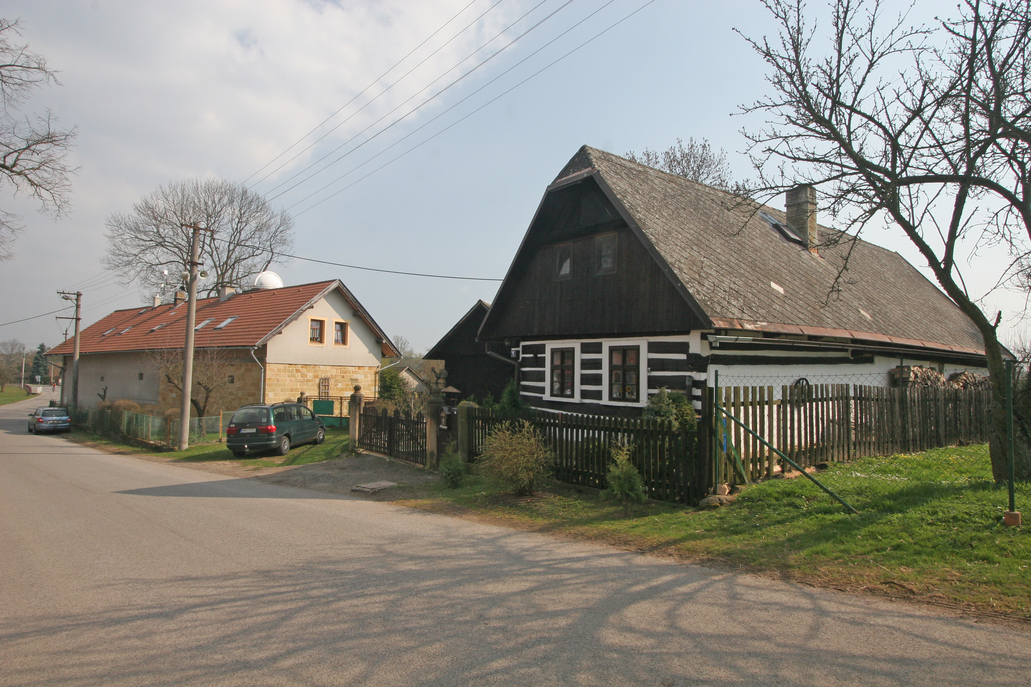 Náchodsko čp. 15